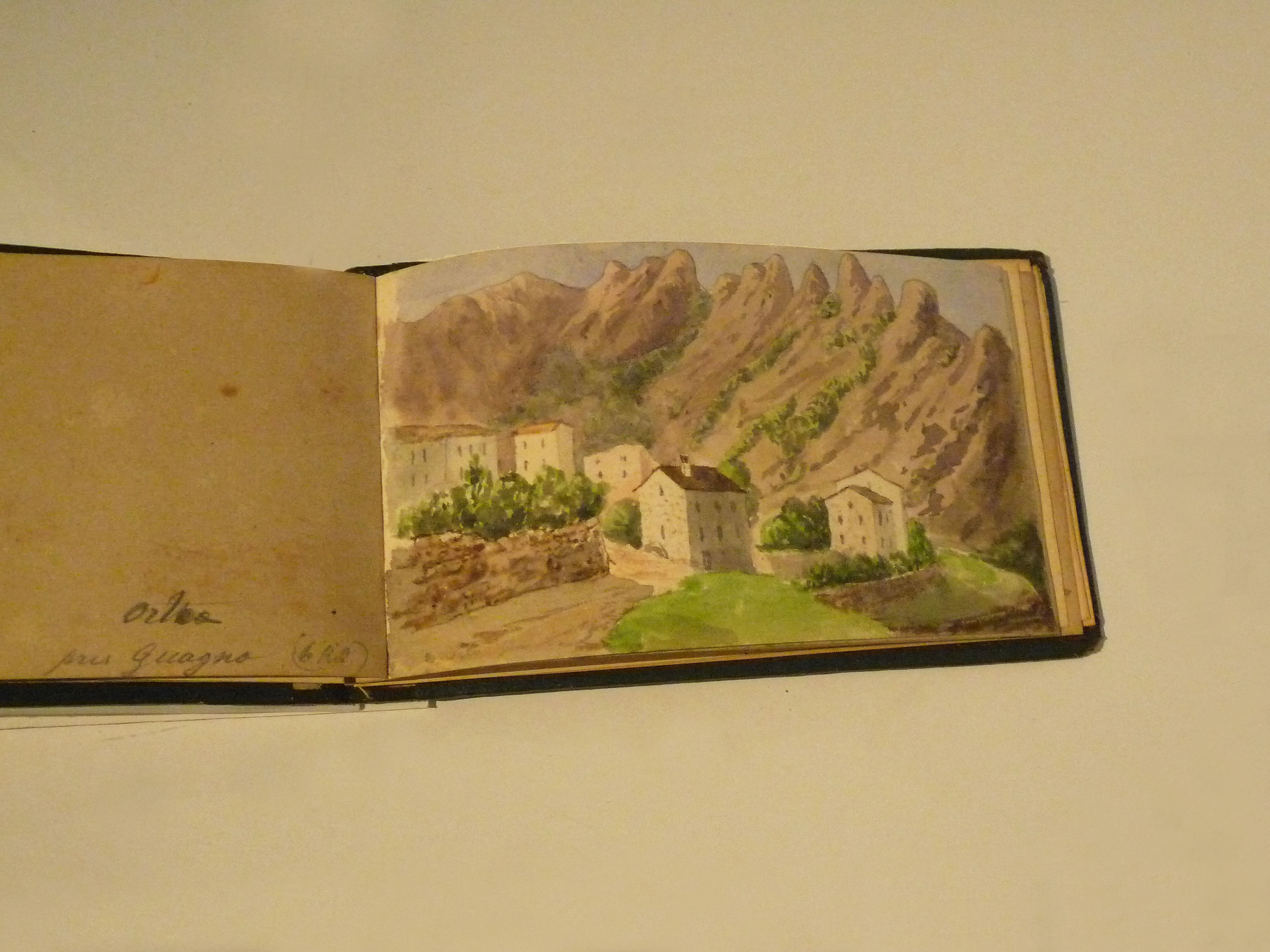 Carnet de croquis de Jean Nicolas Karth, Maisons sans cheminée à Guagno, crayon, aquarelle sur papier, date ?, Cabinet des estampes et des dessins de Strasbourg.